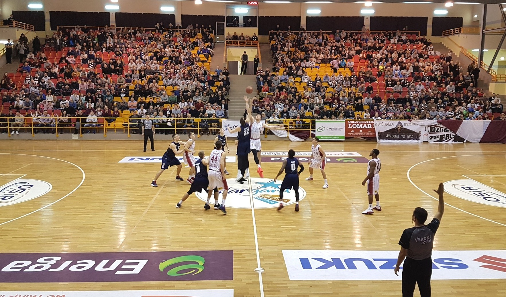 Spójnia Starga - GTG Gliwice (23.12.2018)